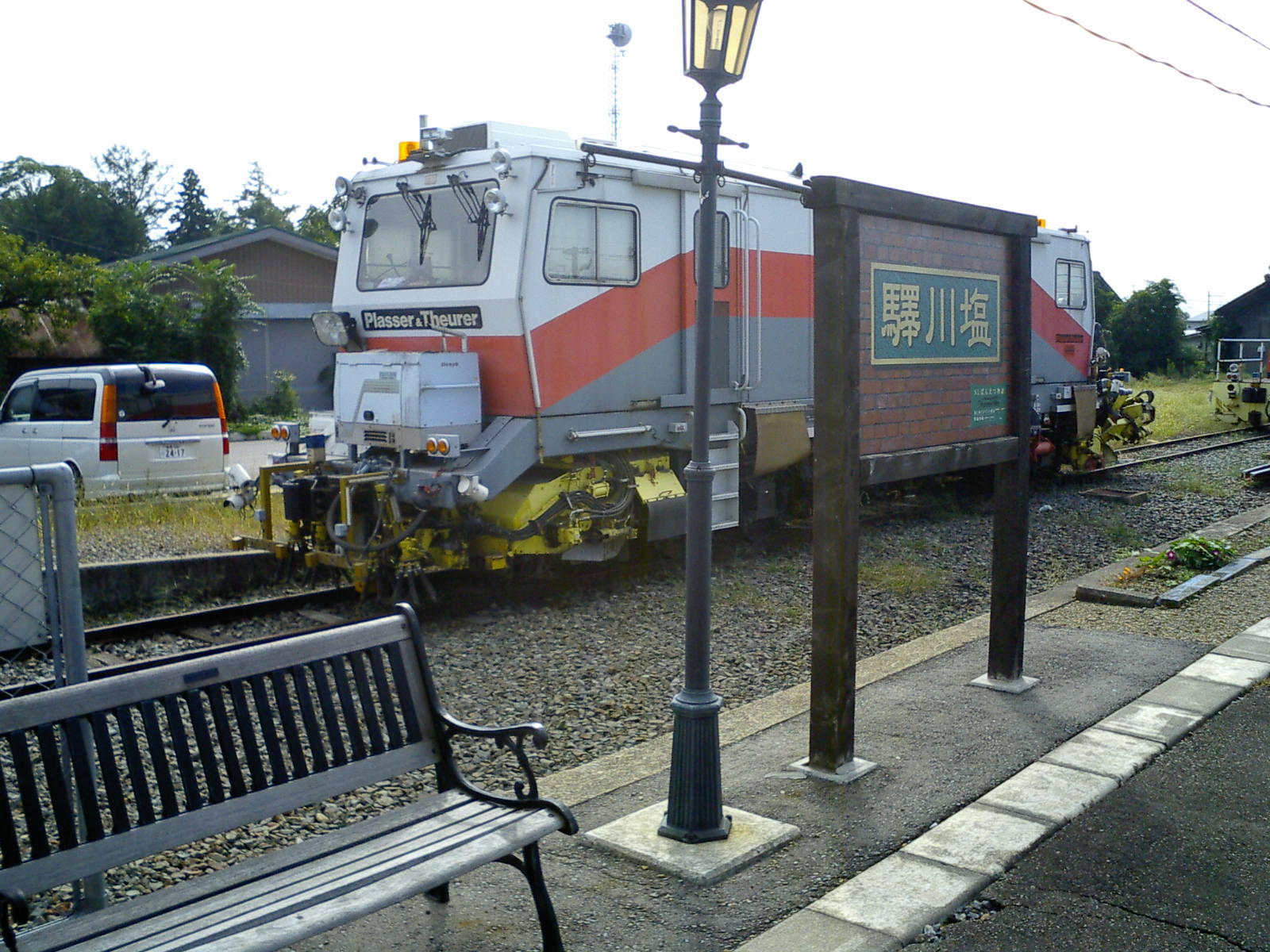 塩川駅1番線にある駅名標。SLばんえつ物語号停車駅であることを示す。